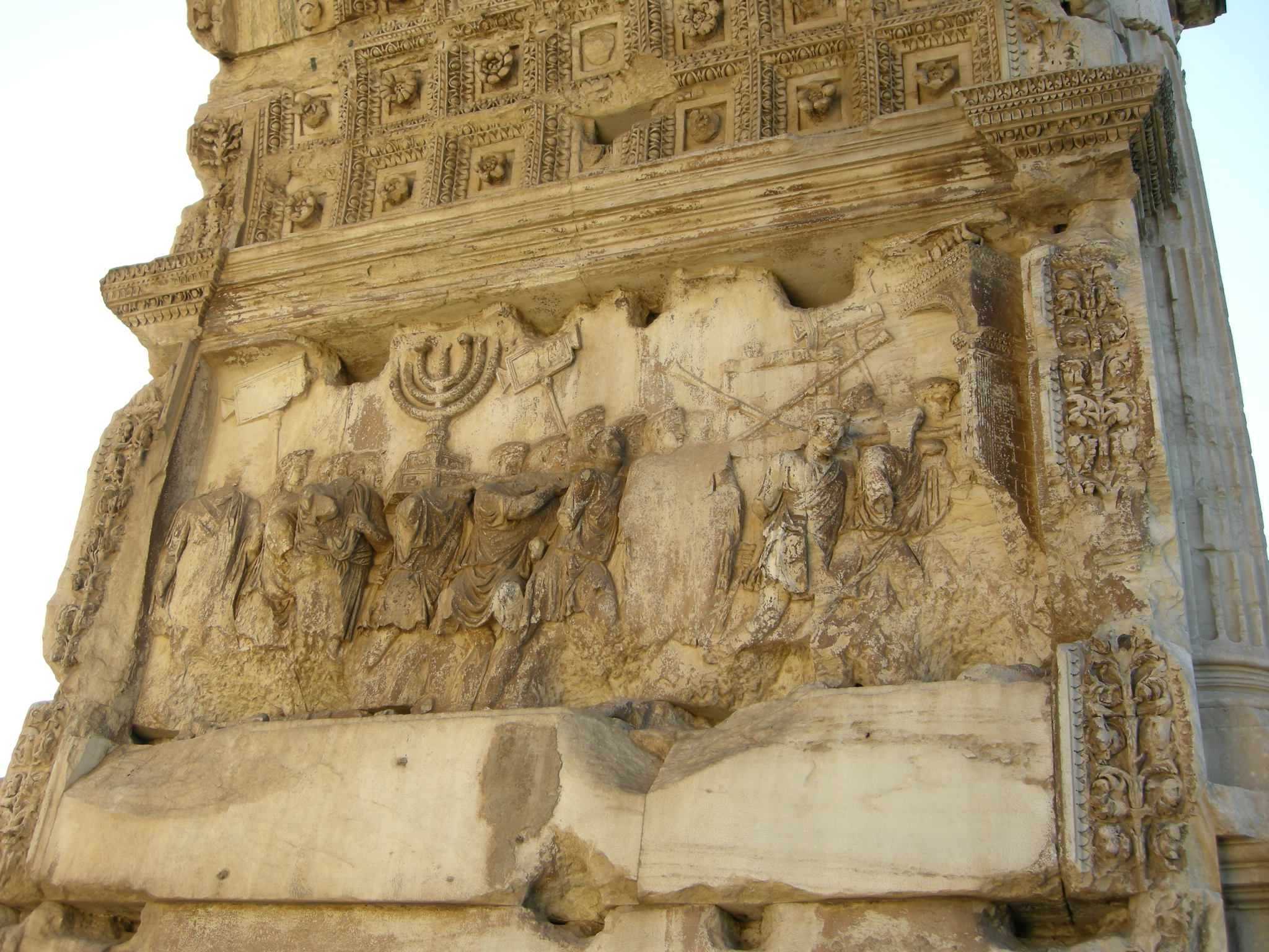 Arco di tito, rilievo del trionfo dopo la presa di gerusalemme